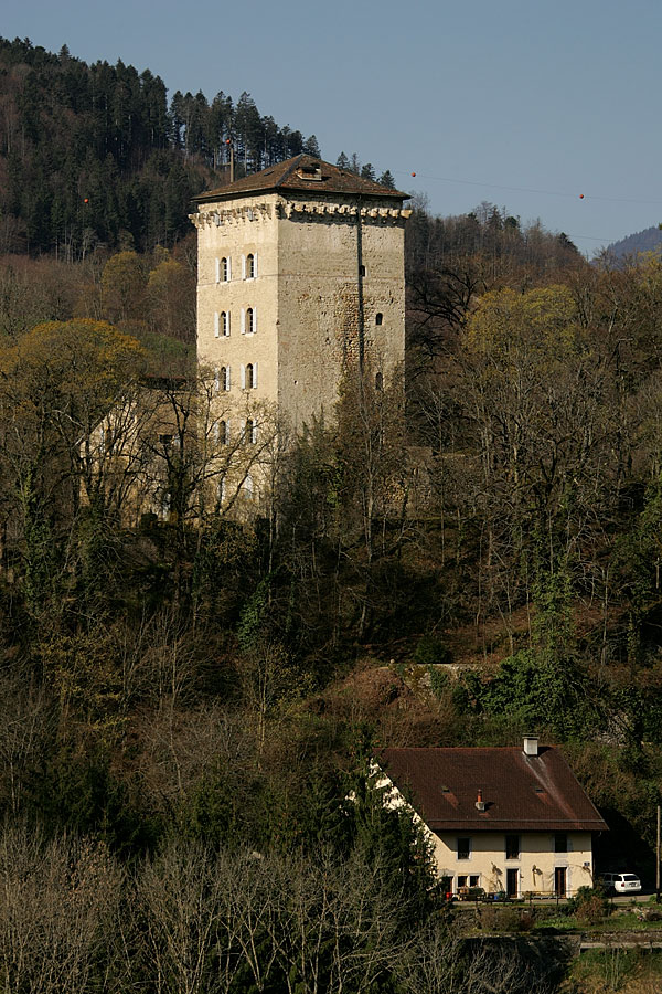 Schloss in Les Clées